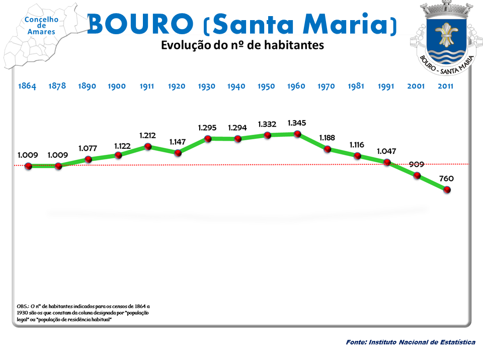 Censo 2011